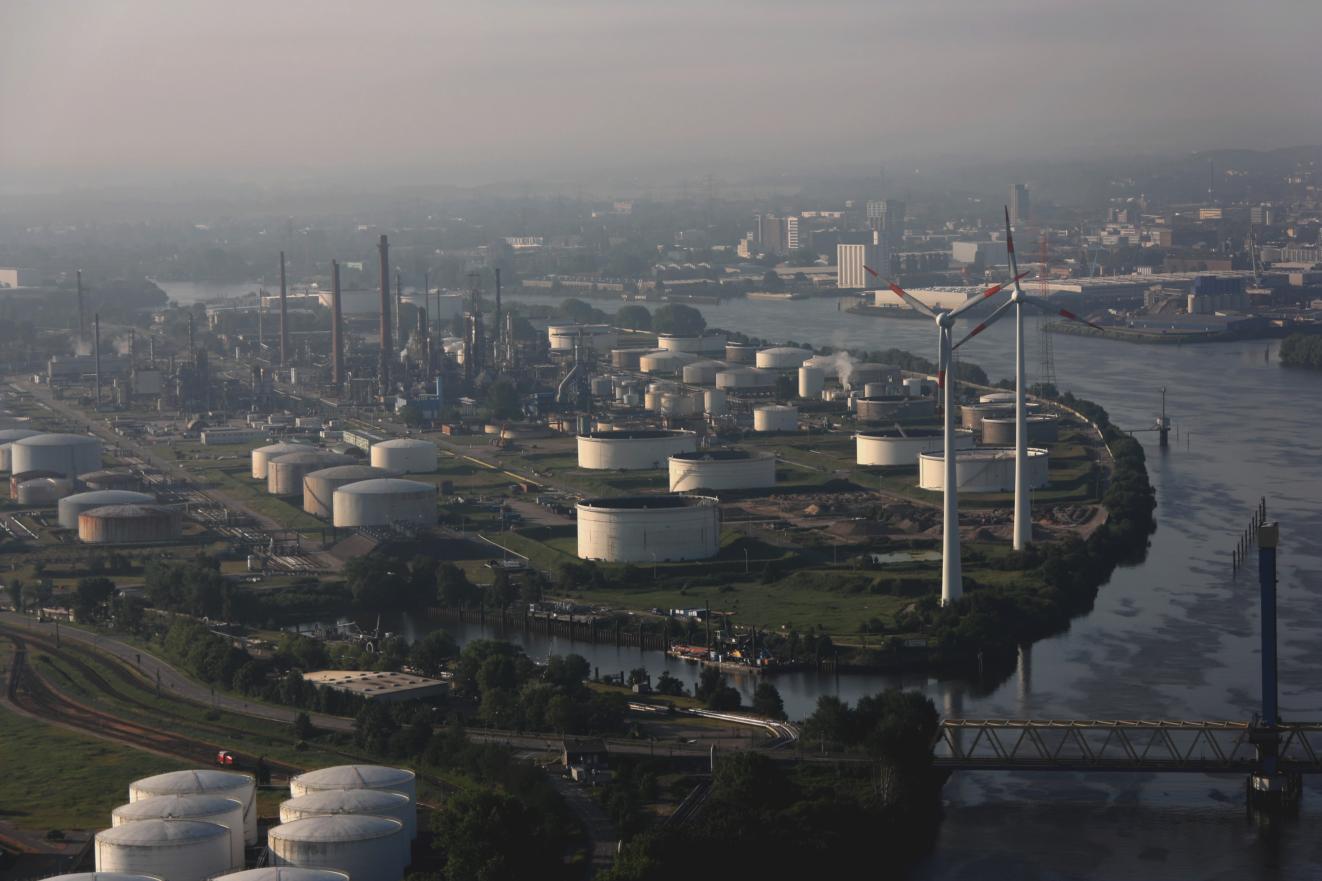 Hamburger Hafen, Betriebsgelände Shell auf der Kattwyk